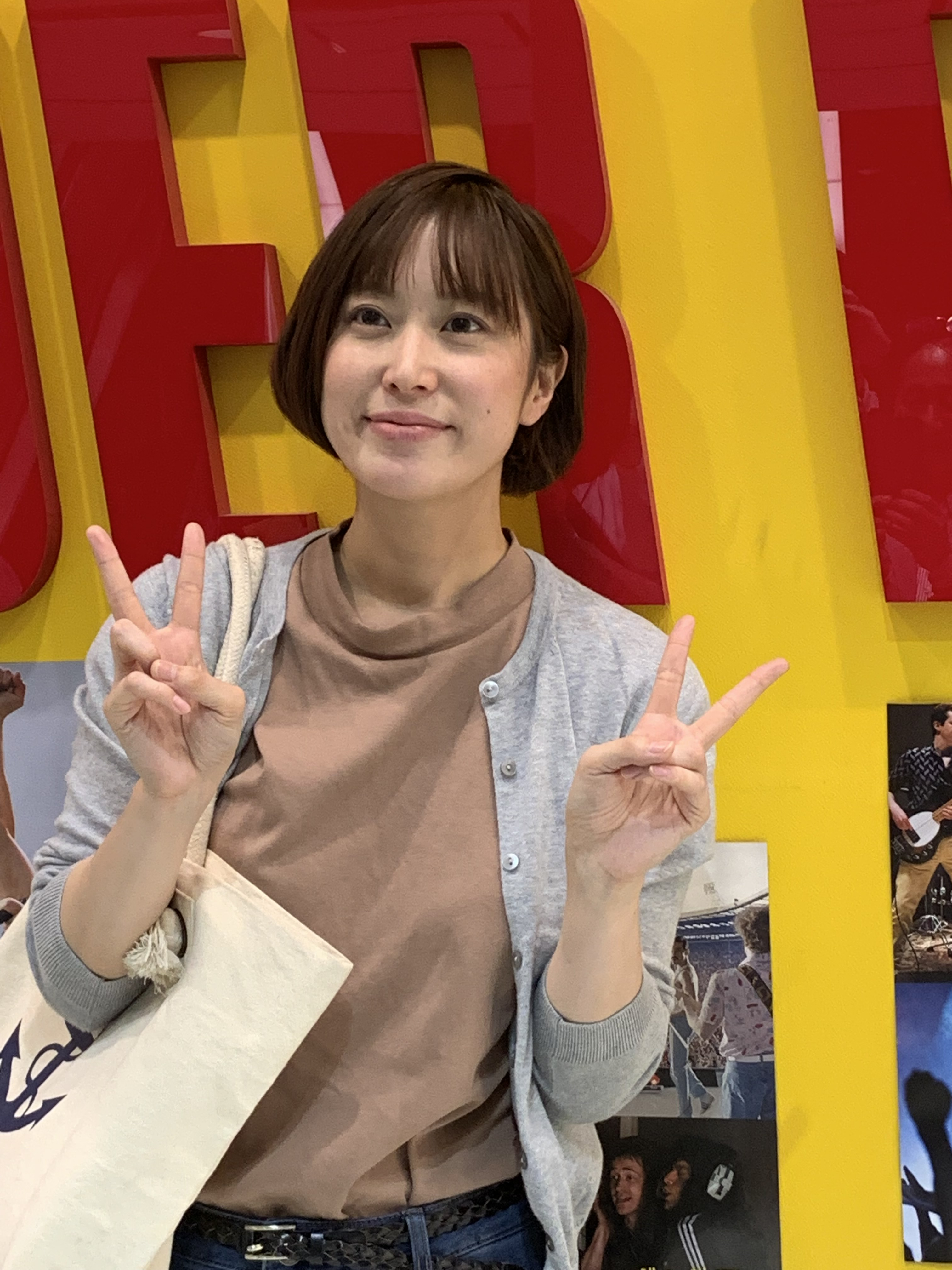 2019.5.13村上恵 プライムタイムレポート（横浜ビブレ内、タワーレコード）